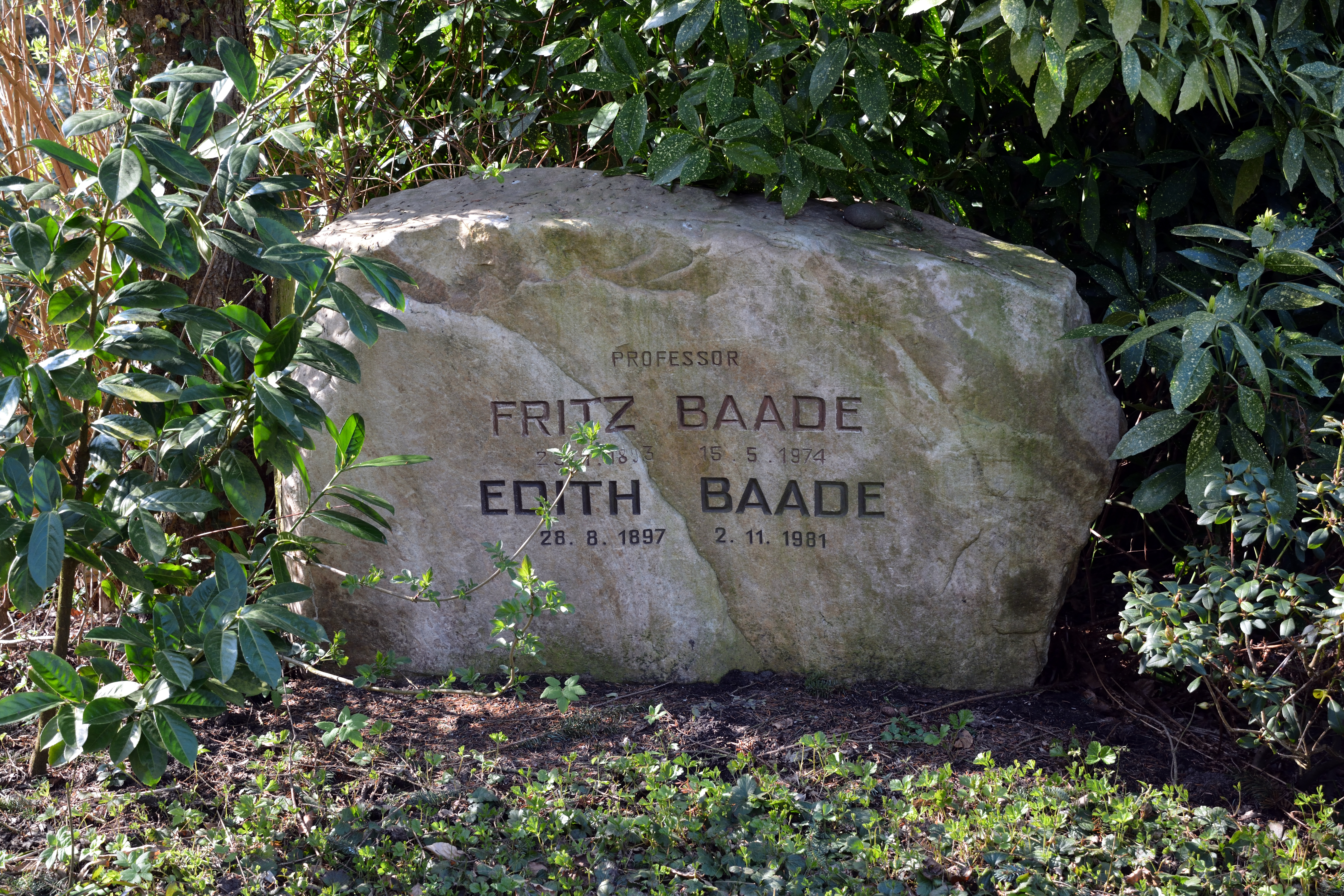 Impressionen vom Nordfriedhof in Kiel: Grab von Fritz Baade